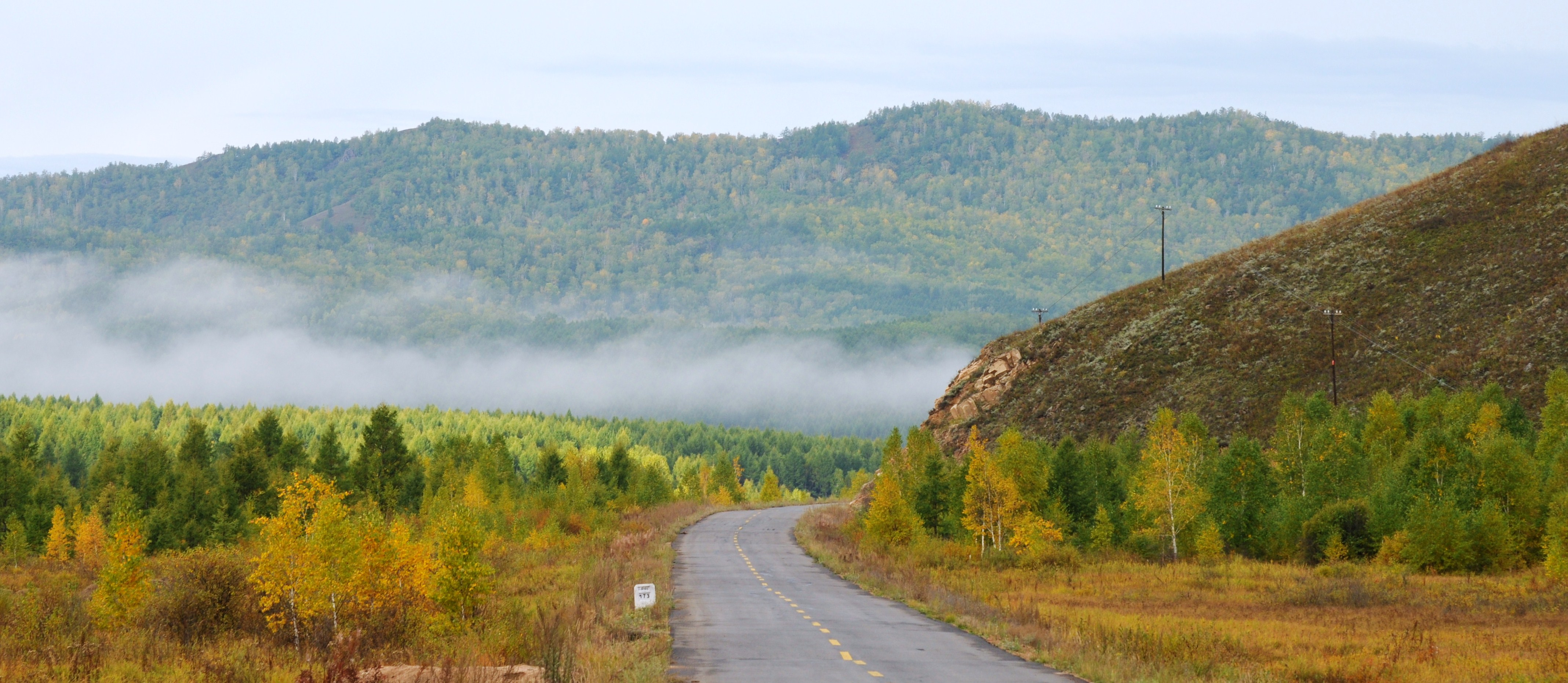 莫尔道嘎 通往森林深处的道路